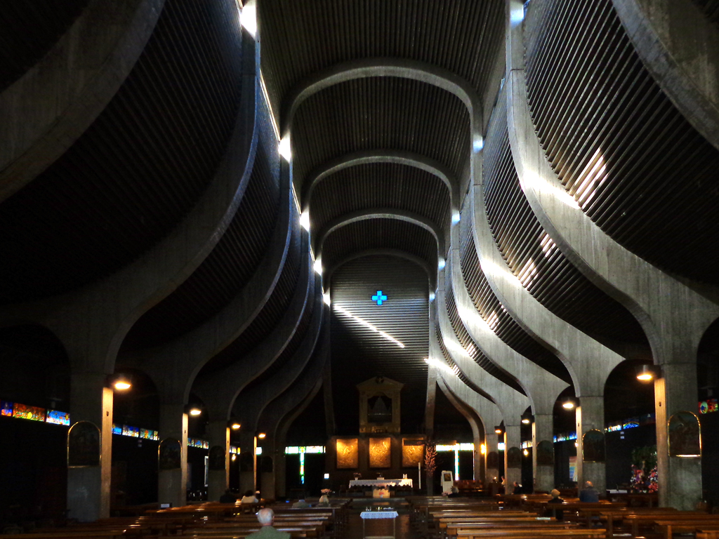 Milano, chiesa di San Nicolao della Flue, l’interno.